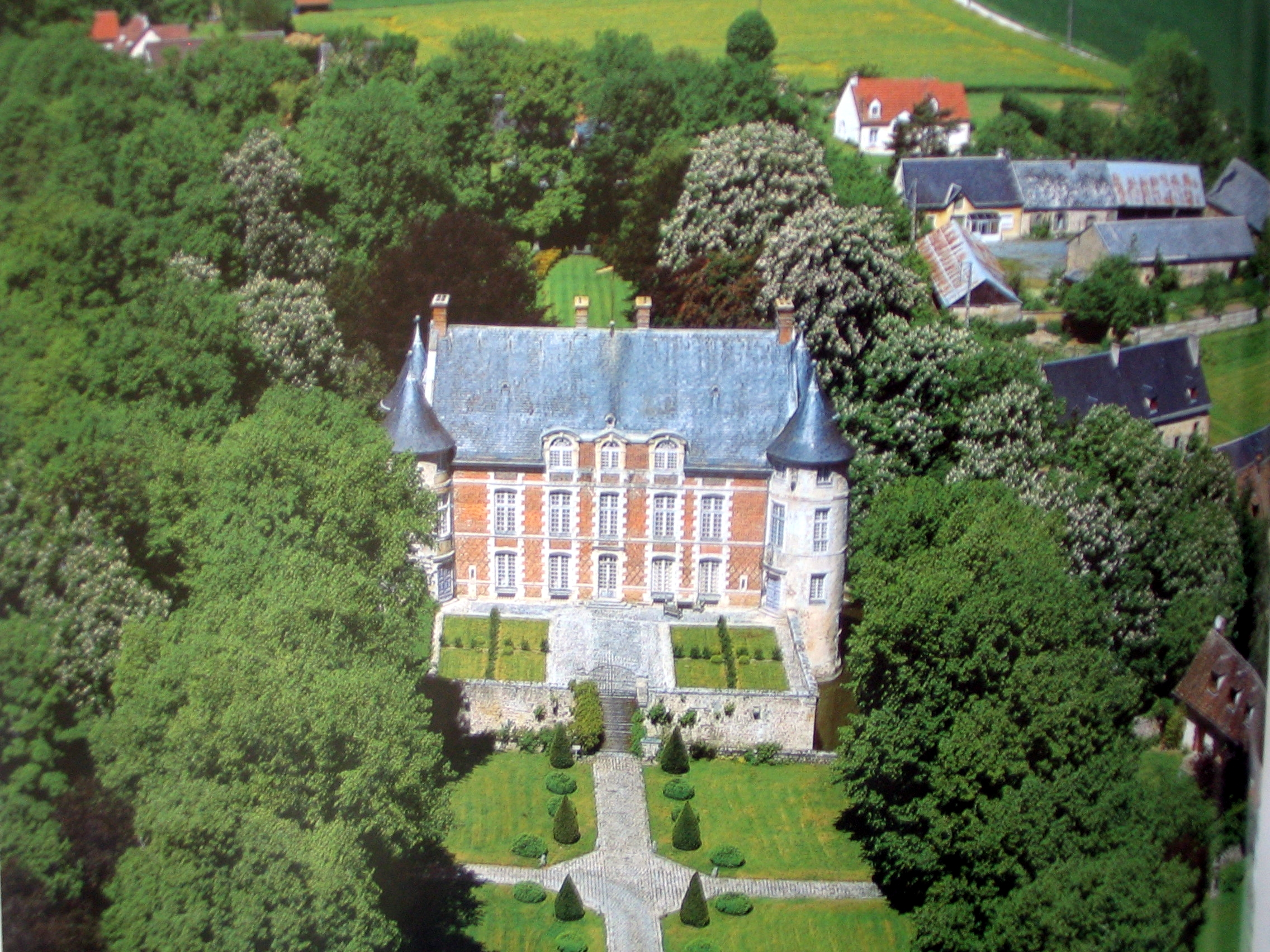 Замок Левевилль, Франция. Округ Эр на Лауре, около города Шартр. Сканированная страница книги Жеральда Массе "Эр на Луаре с высоты птичьего полёта"